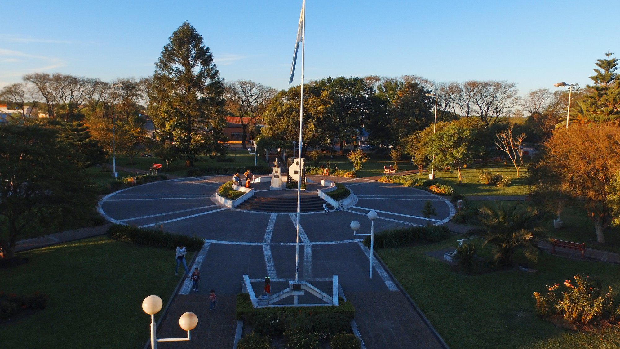 Plaza central de la ciudad de Federal